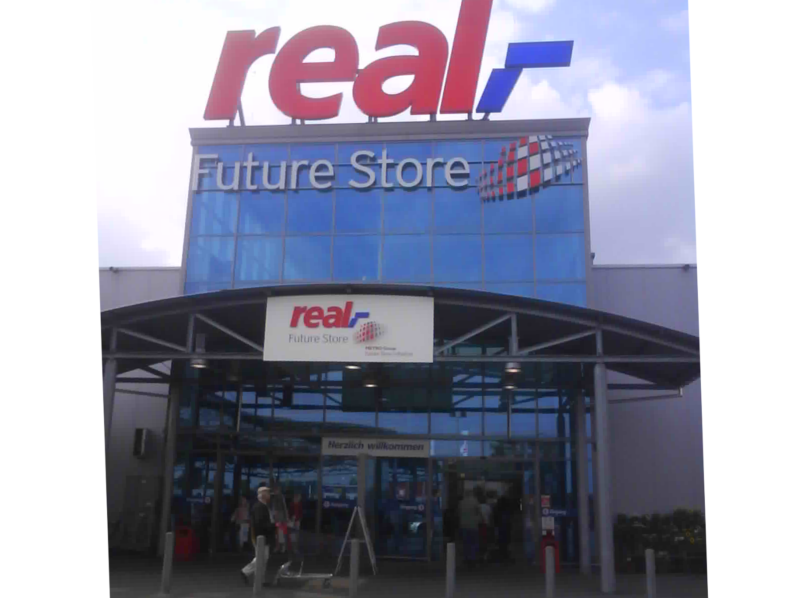 Der Eingang des real Future Stores